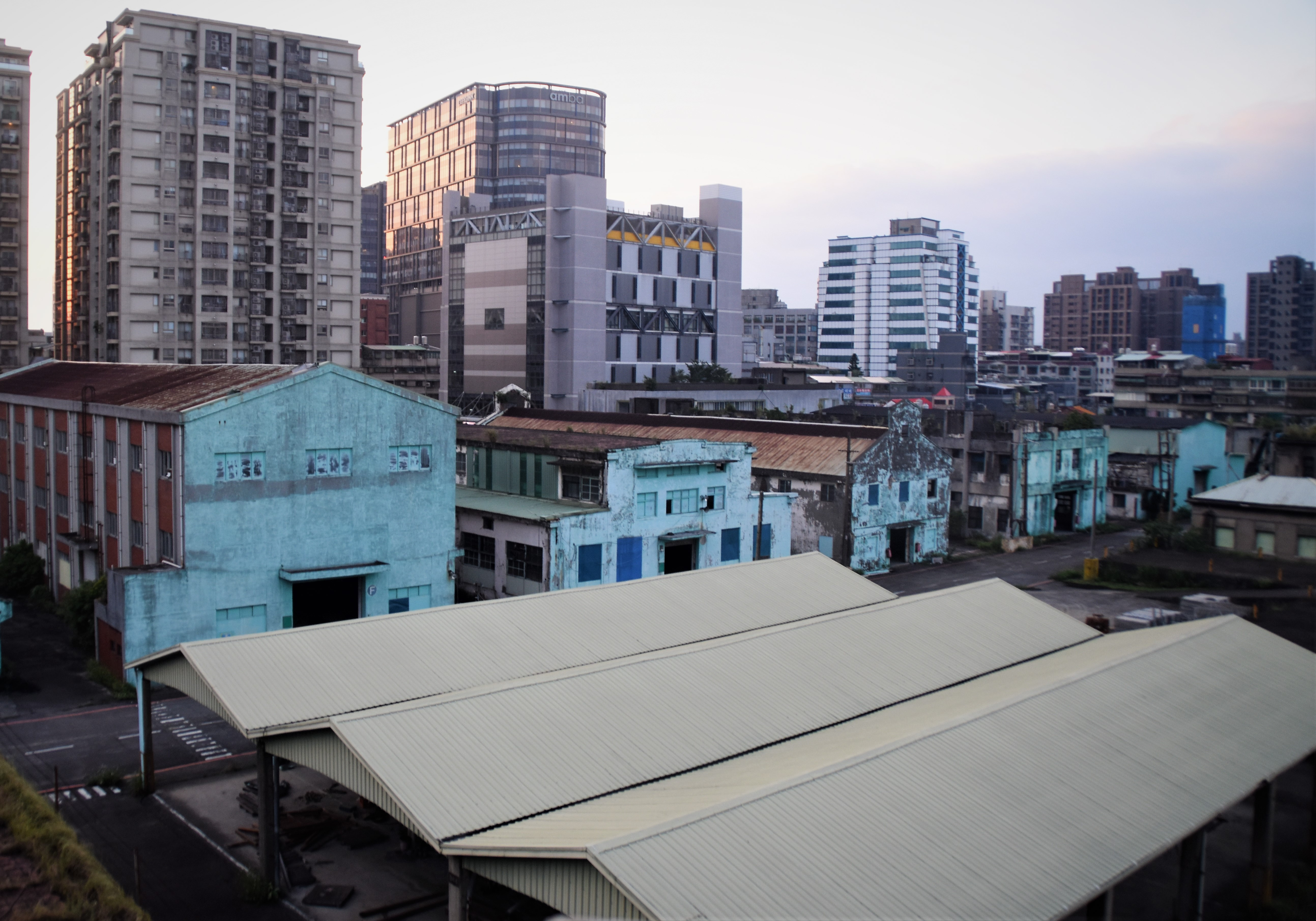 臺電中心倉庫－P庫廠房